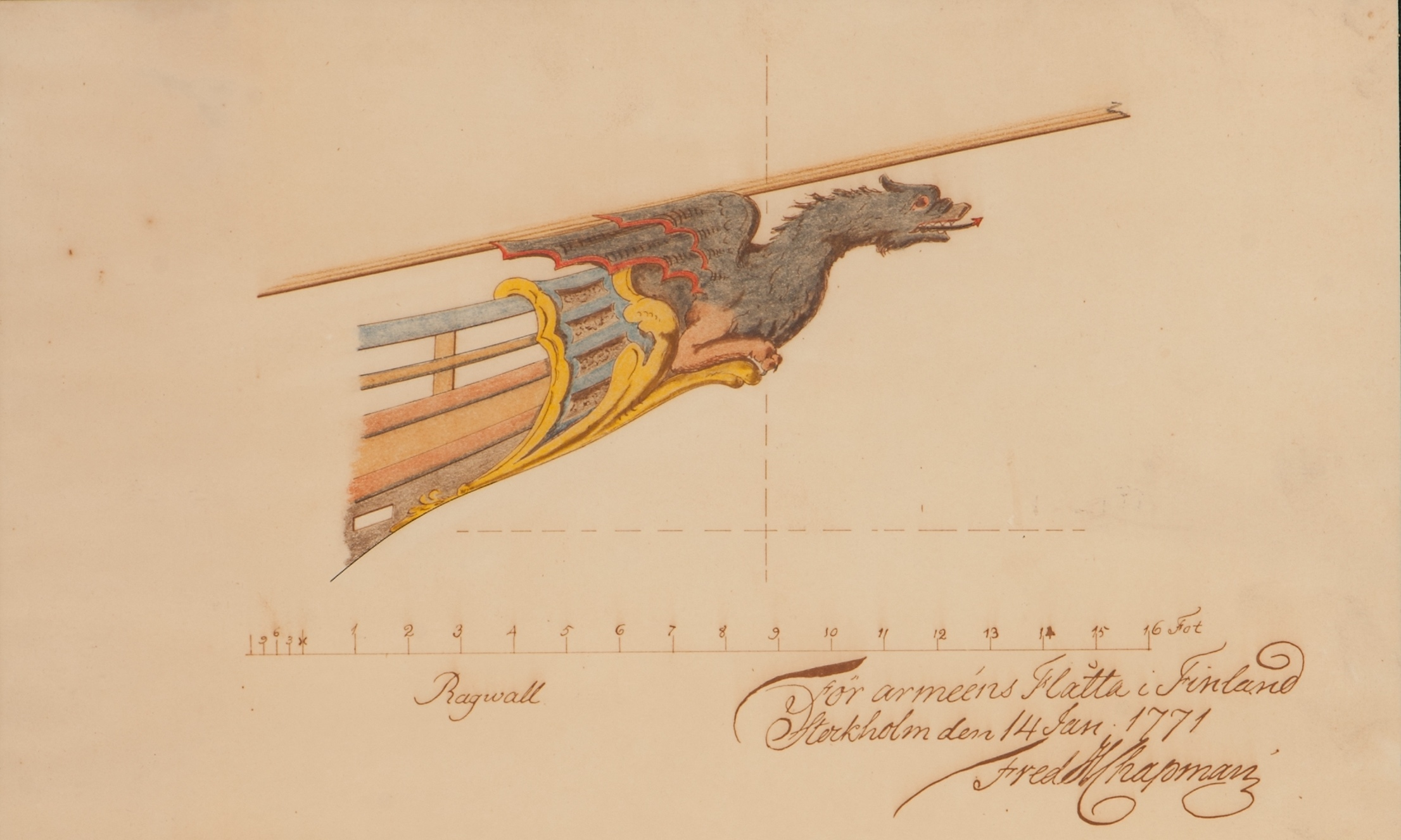 Ritning av galjon till fartyget Ragvald i Arméns flotta. Målning från 1771.